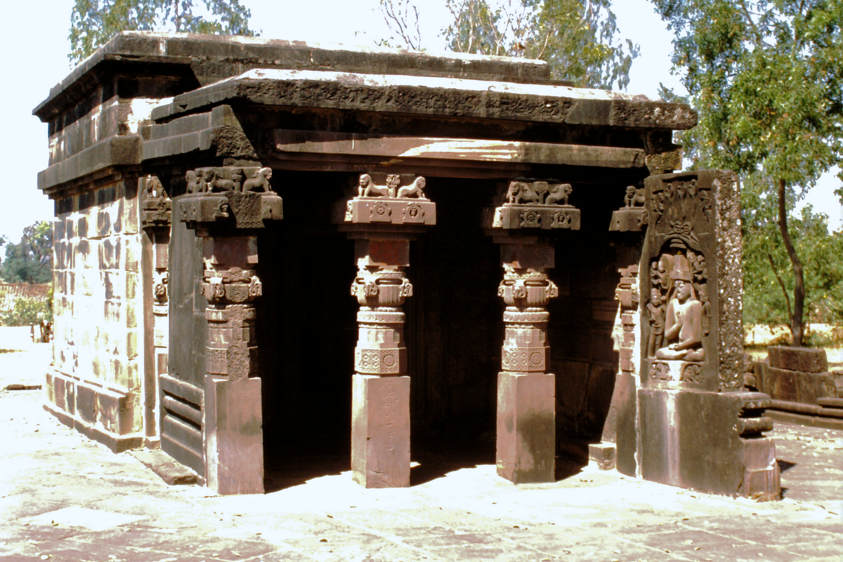 Tigowa, Kankali-Devi-Tempel